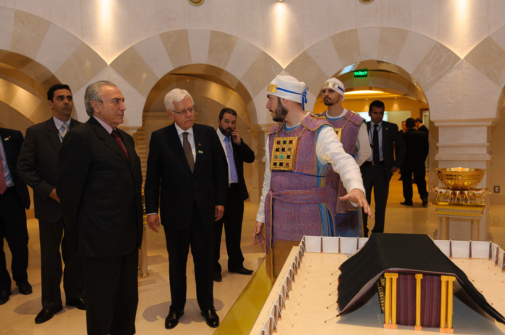 31-07-2014 - Michel Temer participa de inauguração do Templo de Salomão em São Paulo